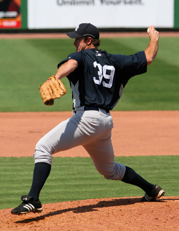 Ross Ohlendorf, Spring Training 2008 23:27, 8 April 2009 . . BubbaFan . . 620×800 (86 KB)